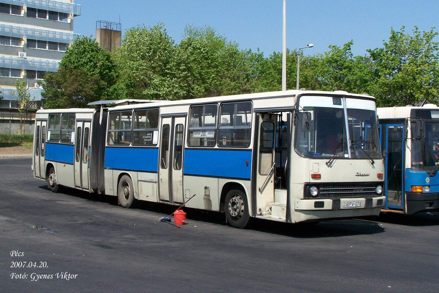 Ikarus 280-as Pécsett a 20A vonalon